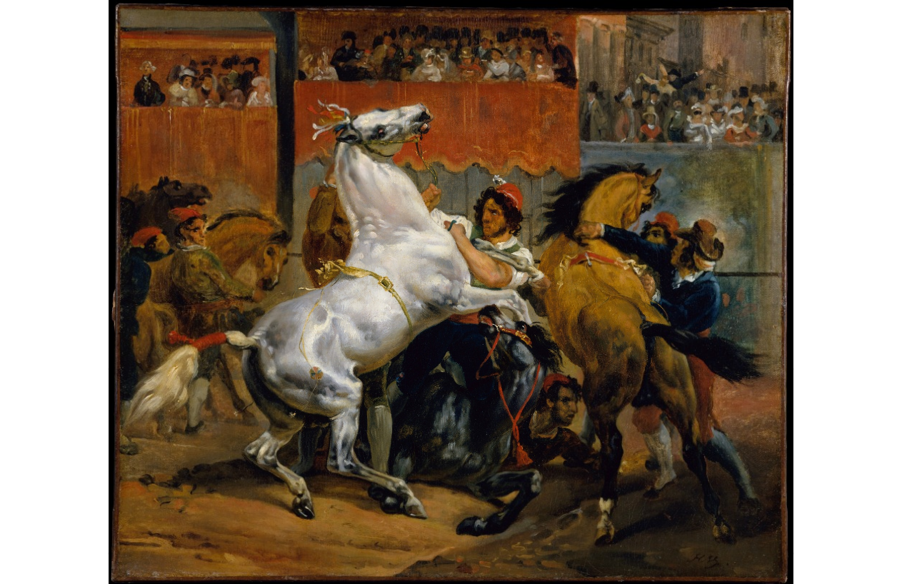 Le départ de la course de chevaux libres au Carnaval de Rome. Huile sur toile 46 x 53 cm, conservée au Metropolitan museum de New York. Notice du musée